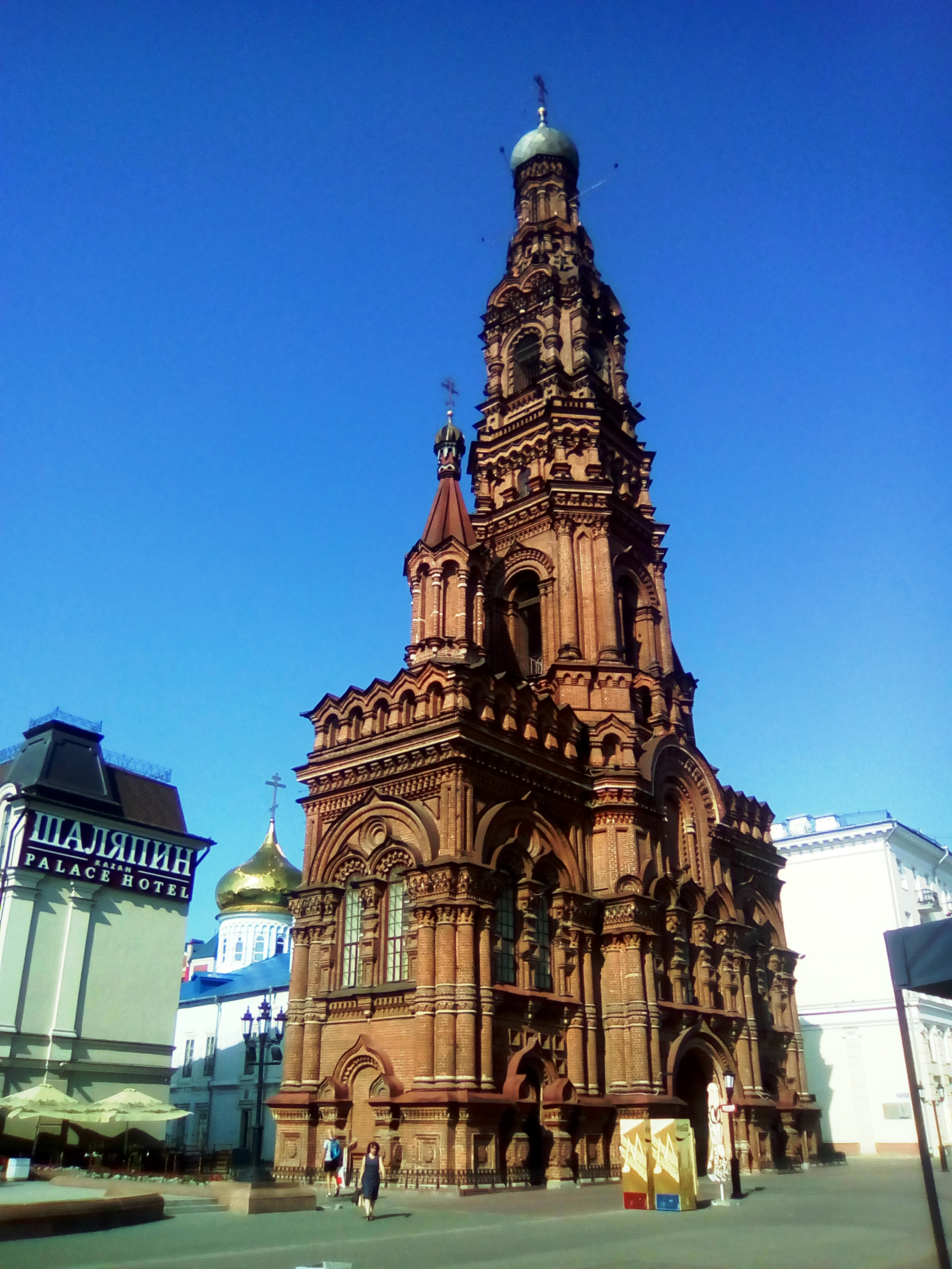 Колокольня: улица Баумана, 76, Казань, Татарстан